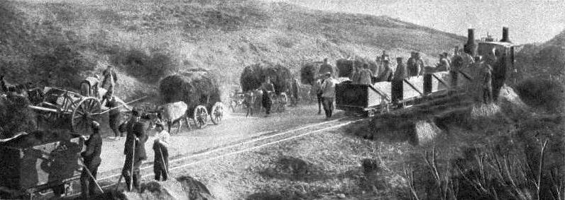 Un convois vers Monastir, des boeufs grecs, au premier plan une voie Decauville construite par les français.